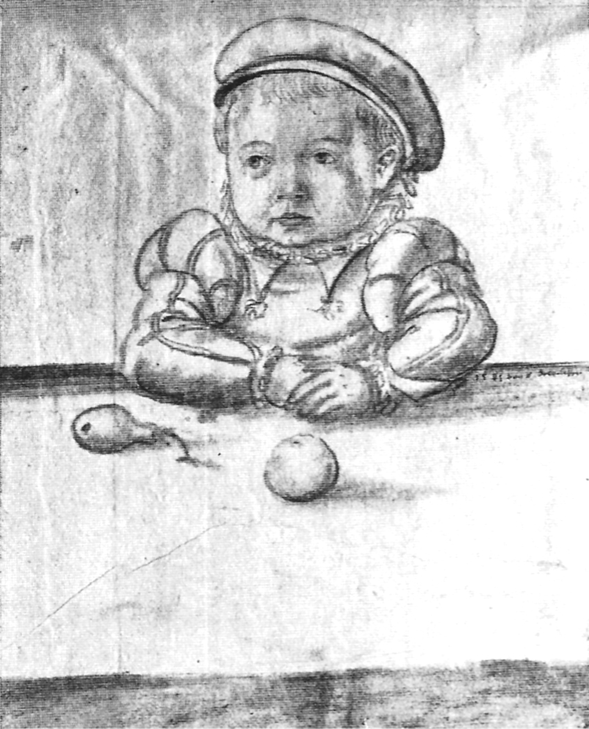 Kinderbildnis